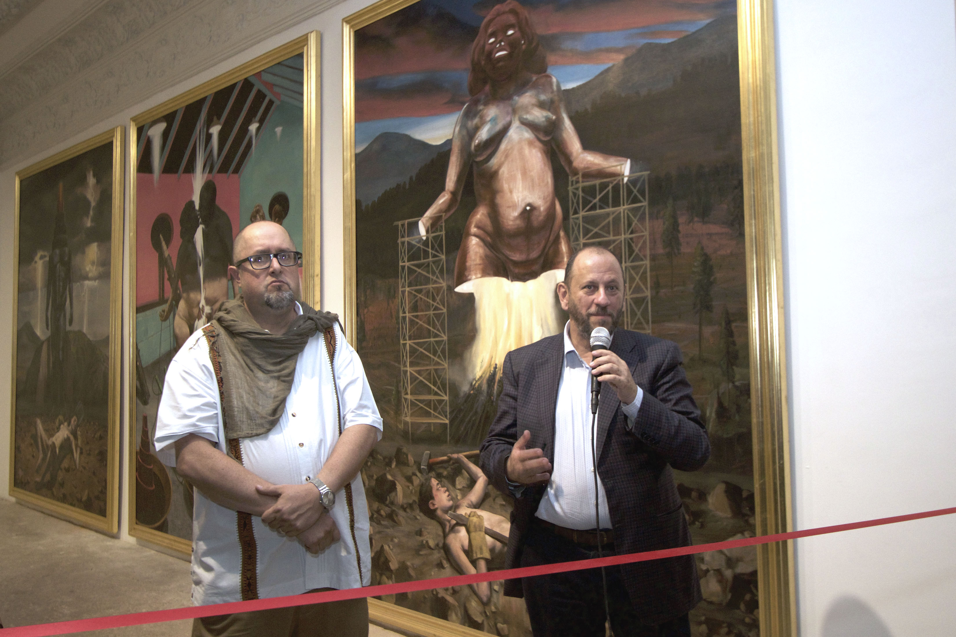 Viernes 21 de septiembre de 2018. En la Galería Maia Contemporary, Eduardo Vázquez Martín, secretario de Cultura de la Ciudad de México, acudió como invitado especial, a la inauguración de la exposición Crisol, de Daniel Lezama, quien cumple cincuenta años de vida y veinte de carrera artística. Fotografía: Milton Martínez / Secretaría de Cultura CDMX.